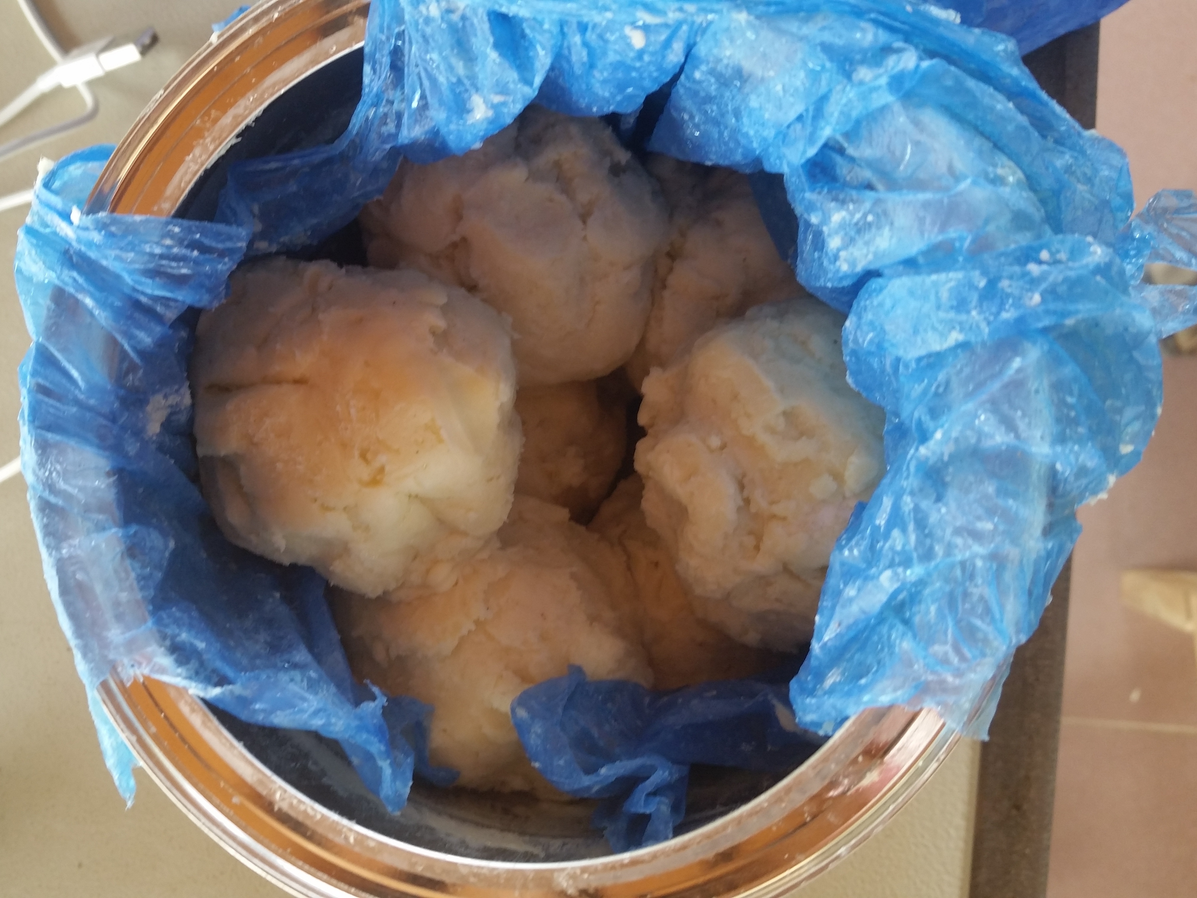 כדורי חמאת שיאה This is an image of food from Côte d'Ivoire